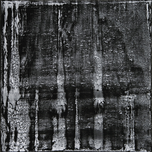 Erdbild